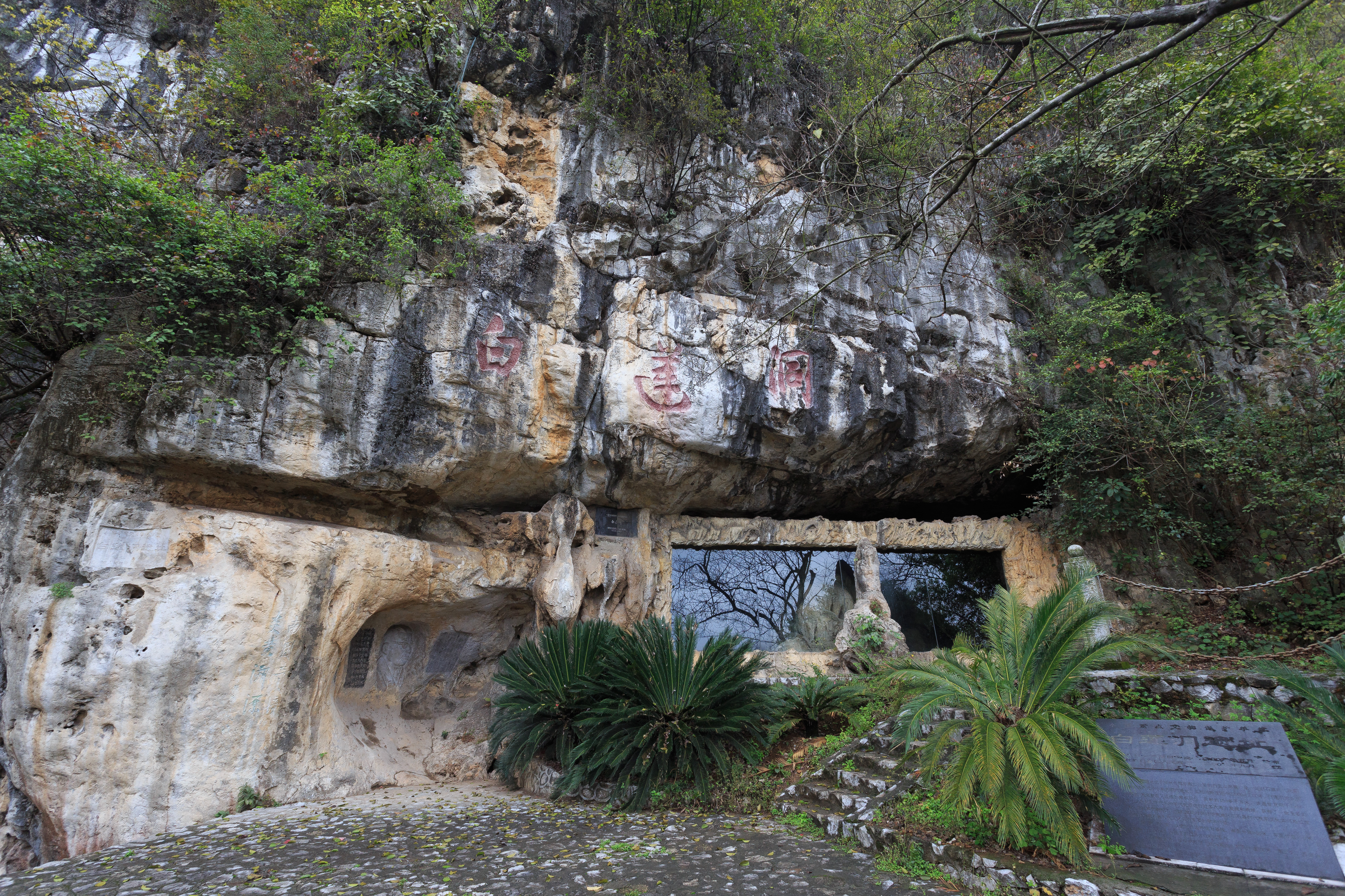 柳州市白莲洞遗址